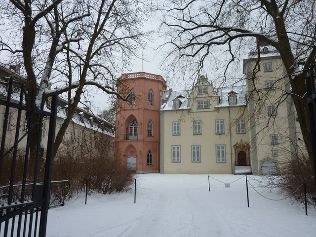 Nassau (Lahn), Schlossstraße und das Stein’sche Schloss.